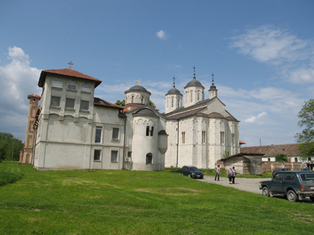 Serbian: Po predanju, manastir Kovilj, u blizini Novog Sada podigao je Sveti Sava u XIII veku. Rusile su ga i palile razne vojske, ali su se monasi vracali i obnavljali zdanje. Zahvaljujuci upornosti danasnjih staresina, povratili su zemlju. Vec na prvi pogled, vidi se da se bratstvo svojski trudi da sve funkcionise u najboljem redu. Manastir je poznat kao mesto u kome se lece zavisnici od opijata. Monasi proizvode gorgonzolu, orahovacu, med...